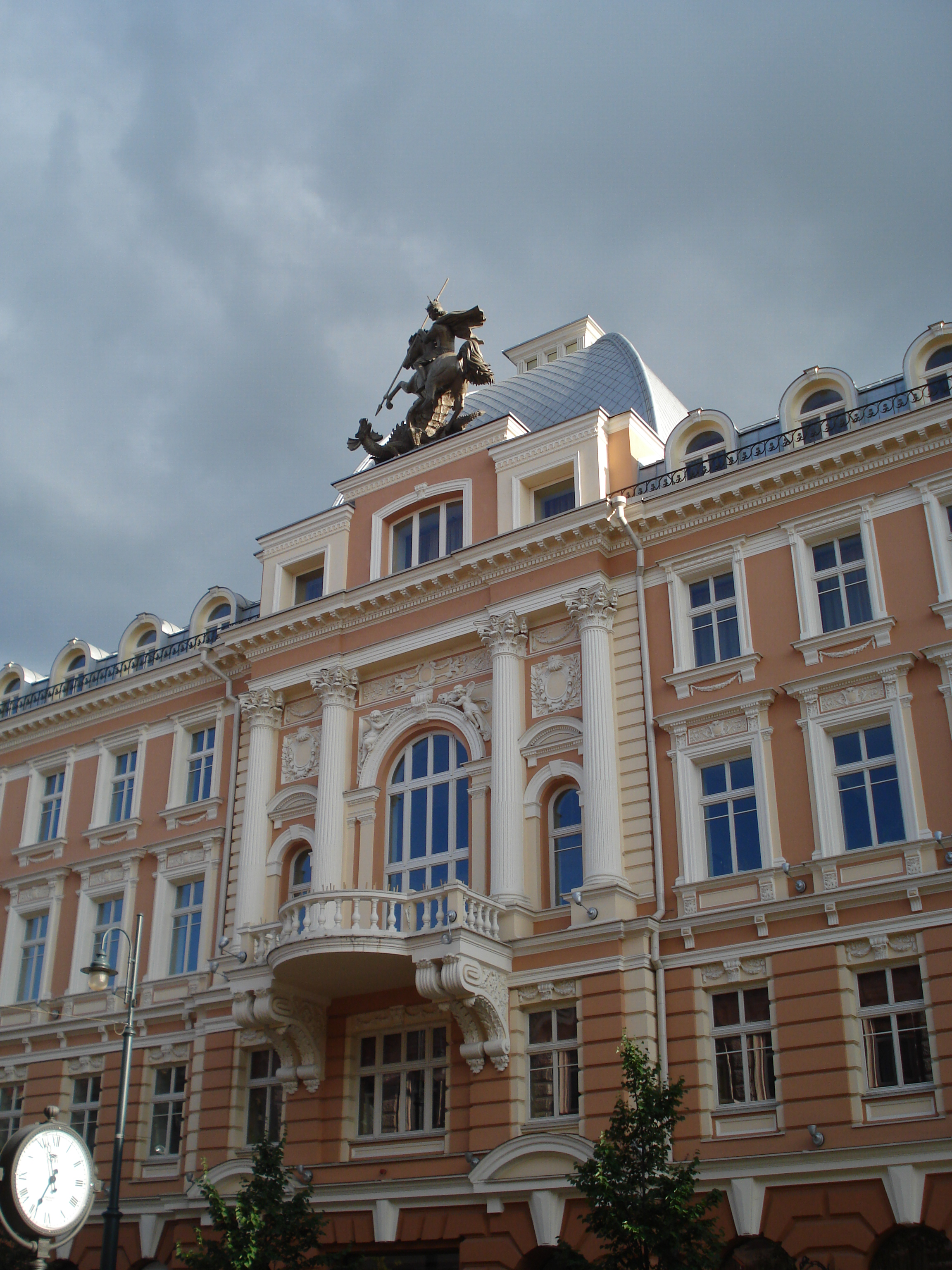 Saint George in Vilnius. Grand Duke Palace, Gedimino prospektas. By Kęstutis Balčiūnas (2005).